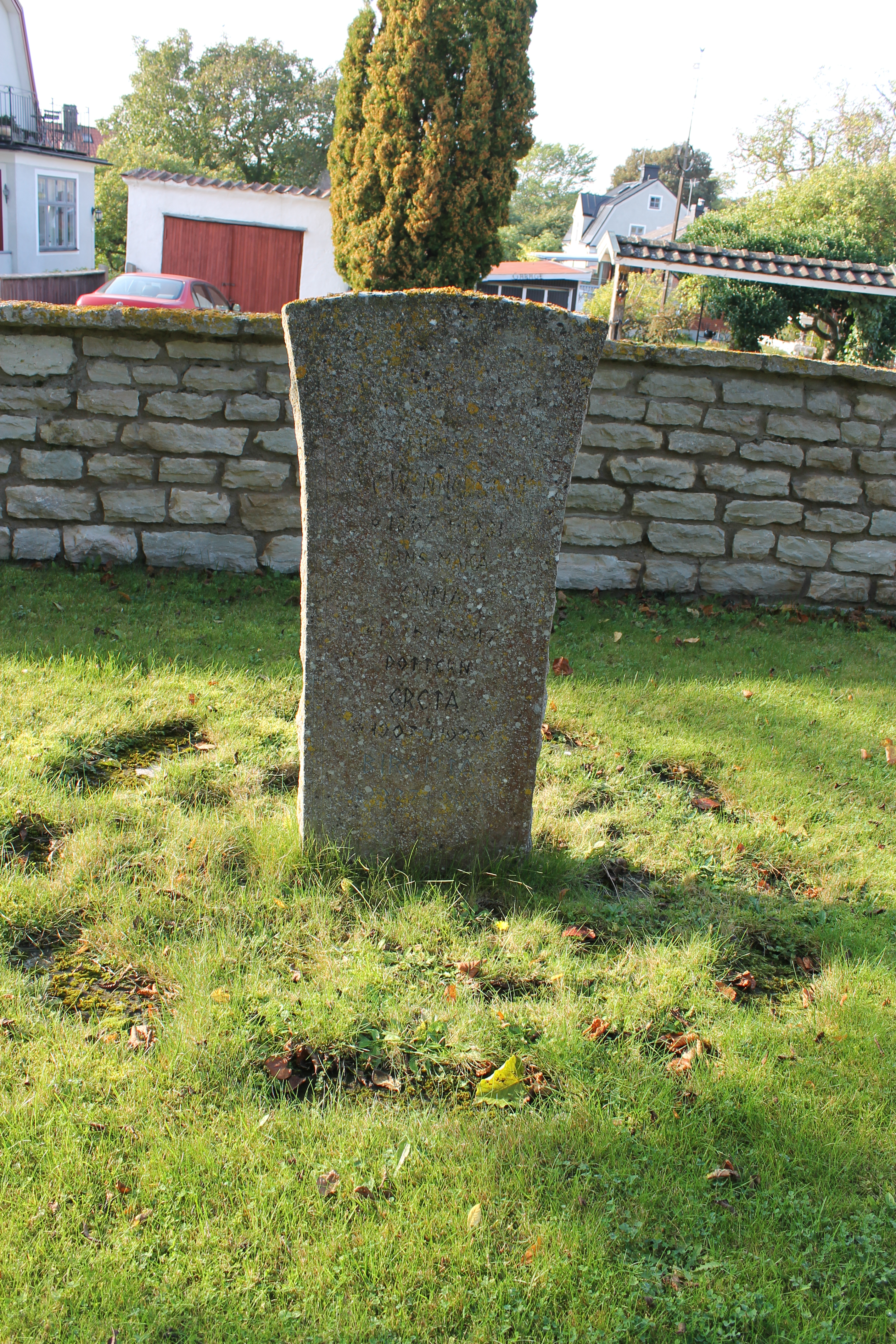 Project Visby